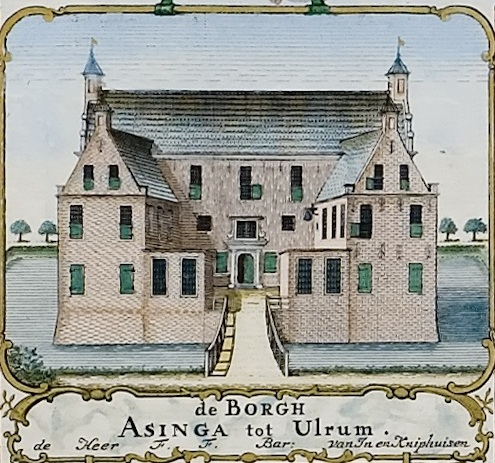 Borg Asinga in Ulrum. Uitsnede uit de kaart van Theodorus Beckeringh uit 1781